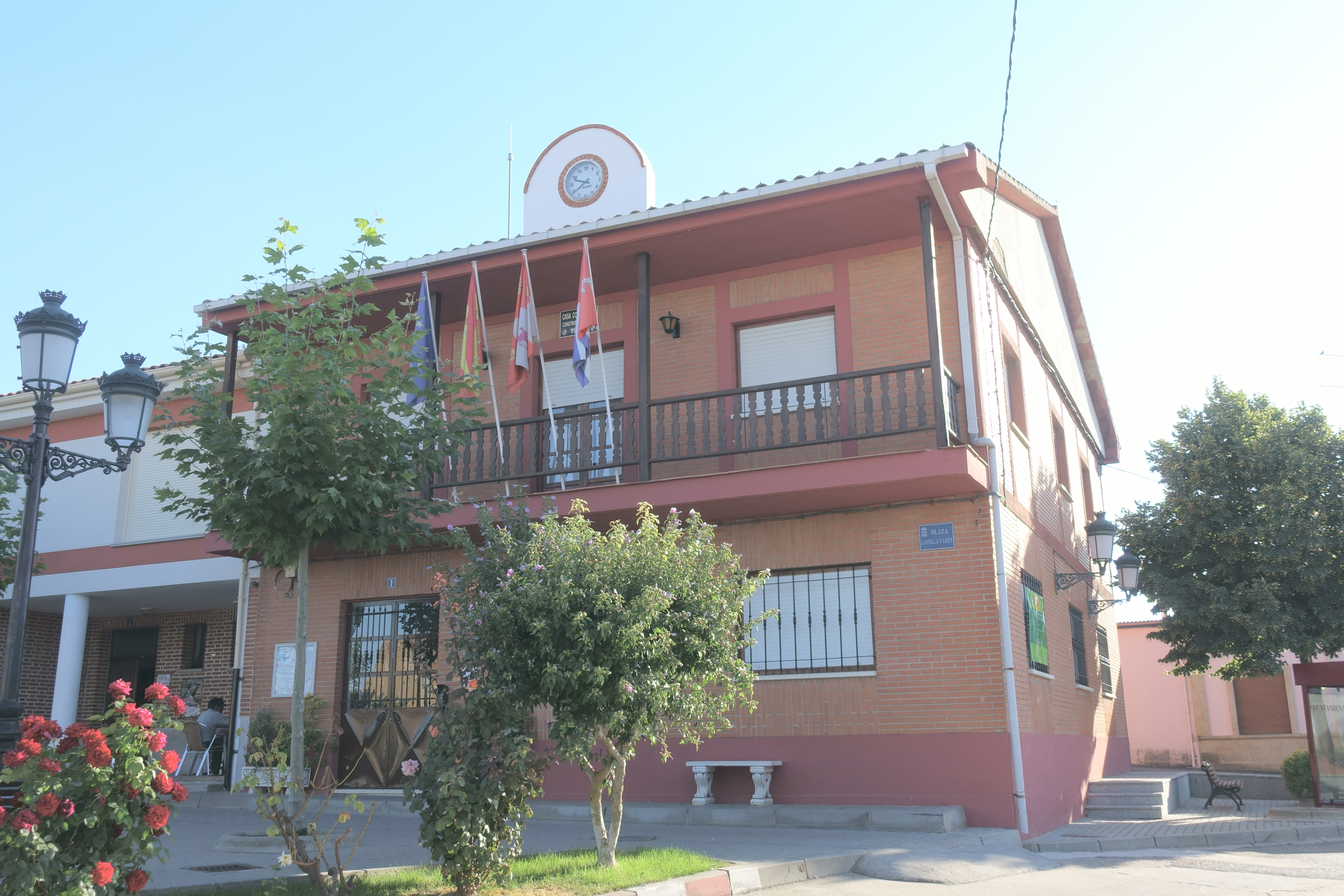 Casa consistorial de Villabuena del Puente (Zamora, España).